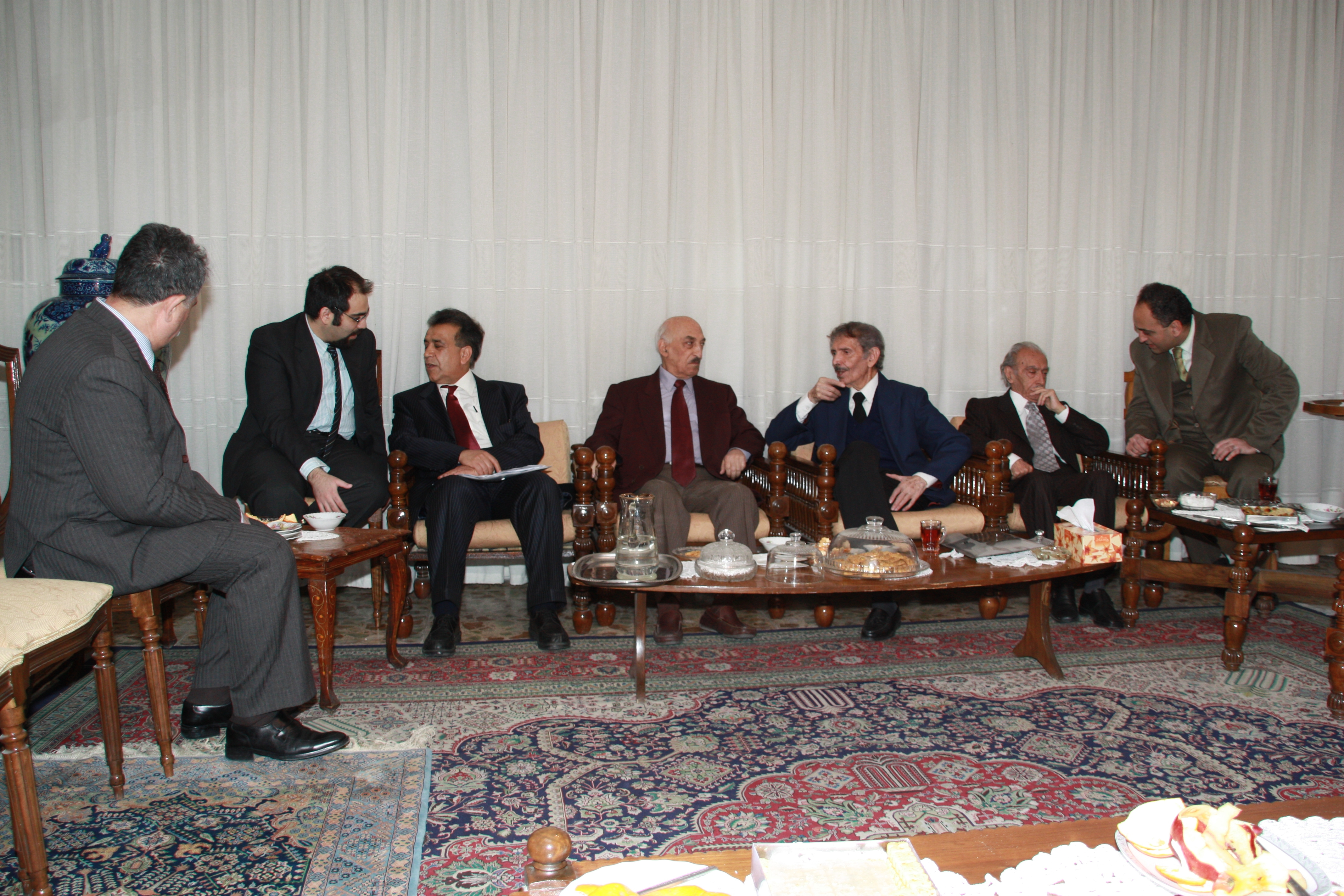 جلسه عمومی -سرای استاد ادیب - دیدار نوروزی